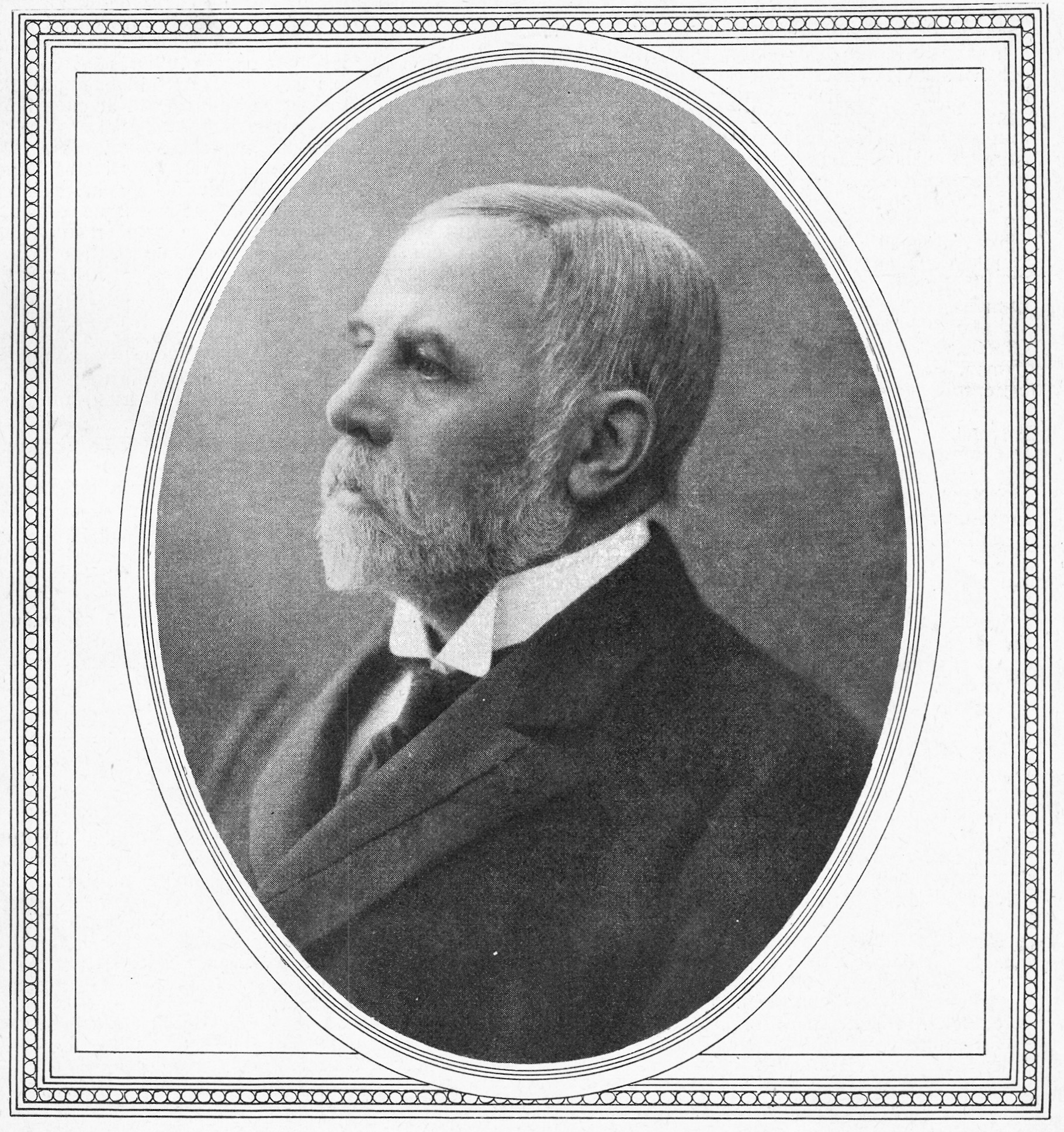 Johan Ekman (1854-1919) på omslaget till Hvar 8 Dag 1912.